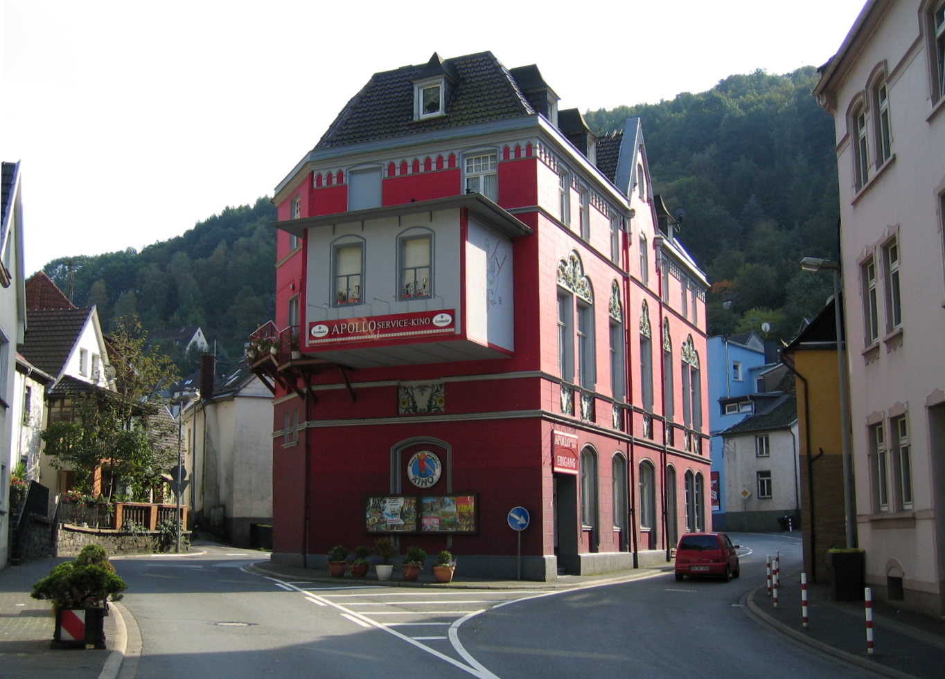 Description: Die alte Schmiede "Holländer" (Baujahr 1901), auf einer Insel in der Mitte der Nettestraße, seit 1930 Nutzung als Kino, Altena Source: selbst fotografiert Date: 9. Okt. 2005 Author: Asio otus